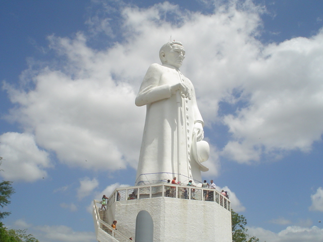 Foto tirada pelo autor em Juazeiro do Norte em Jan 2006